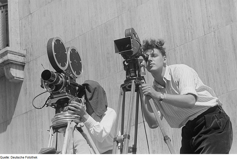 Original image description from the Deutsche FotothekZwei Kameramänner